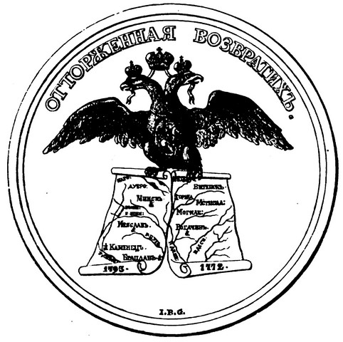 Екатерина: "Отторженная возвратих"